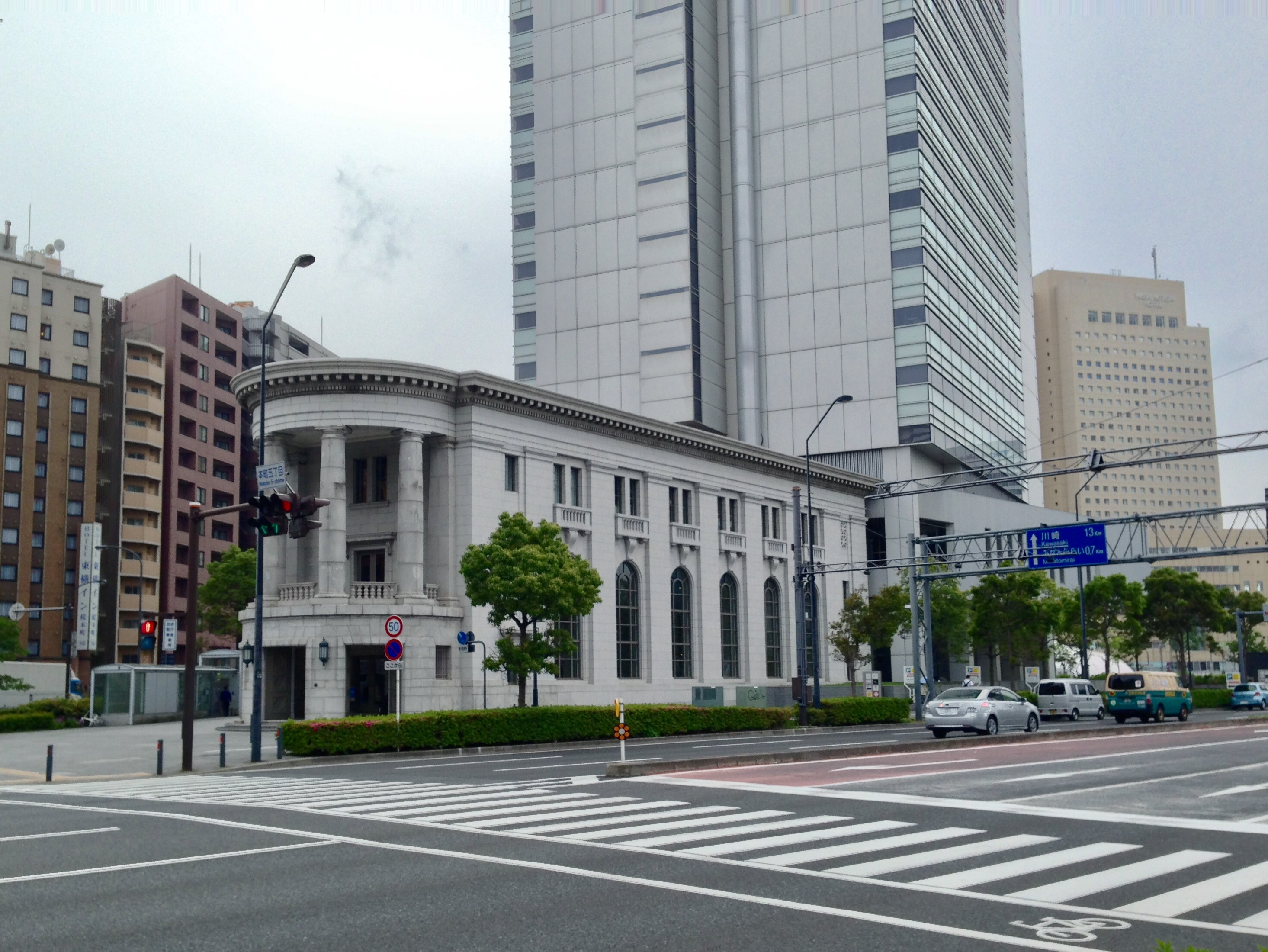 横浜アイランドタワー（北仲通南地区）がある本町五丁目交差点付近。右方より直進する栄本町線に、アイランドタワー左方より本町通り（国道133号）が合流する。